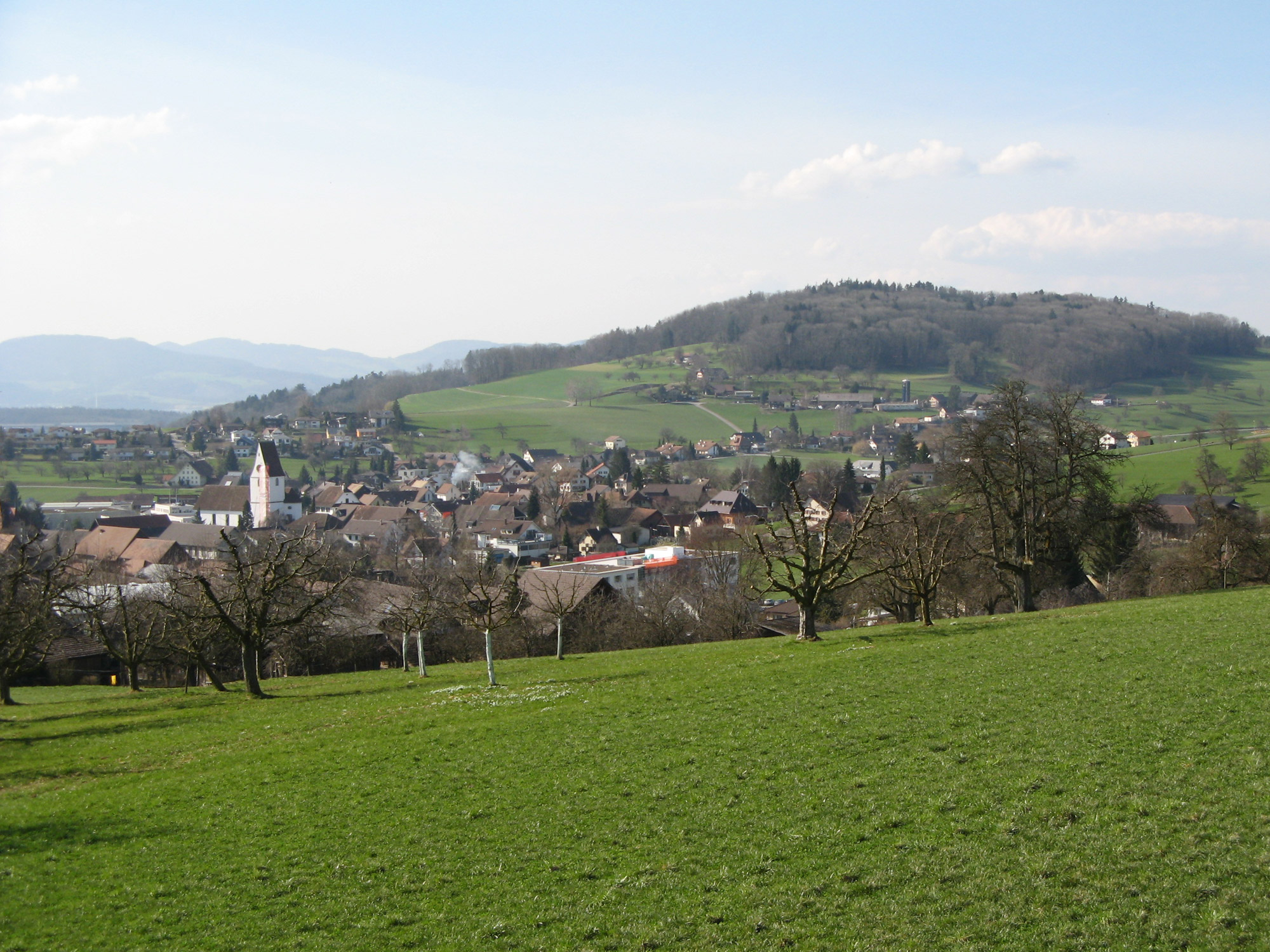 Hägglingen, von Osten her gesehen